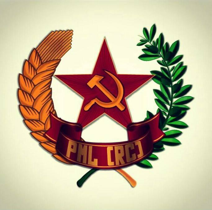 Logo del PML(RC)